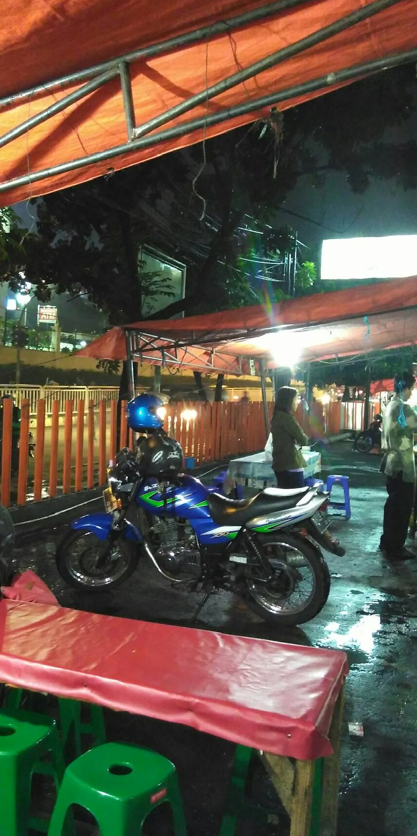 diambil 6 juni 2016 xiaomi redmi 2